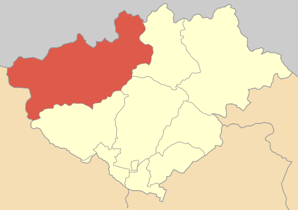 Дем Неврокоп на картата на Ном Драма, Гърция Locator map of Kato Nevrokopi municipality (Δήμος Κάτω Νευροκοπίου) in Drama prefecture (Νομός Δράμας) in Greece.